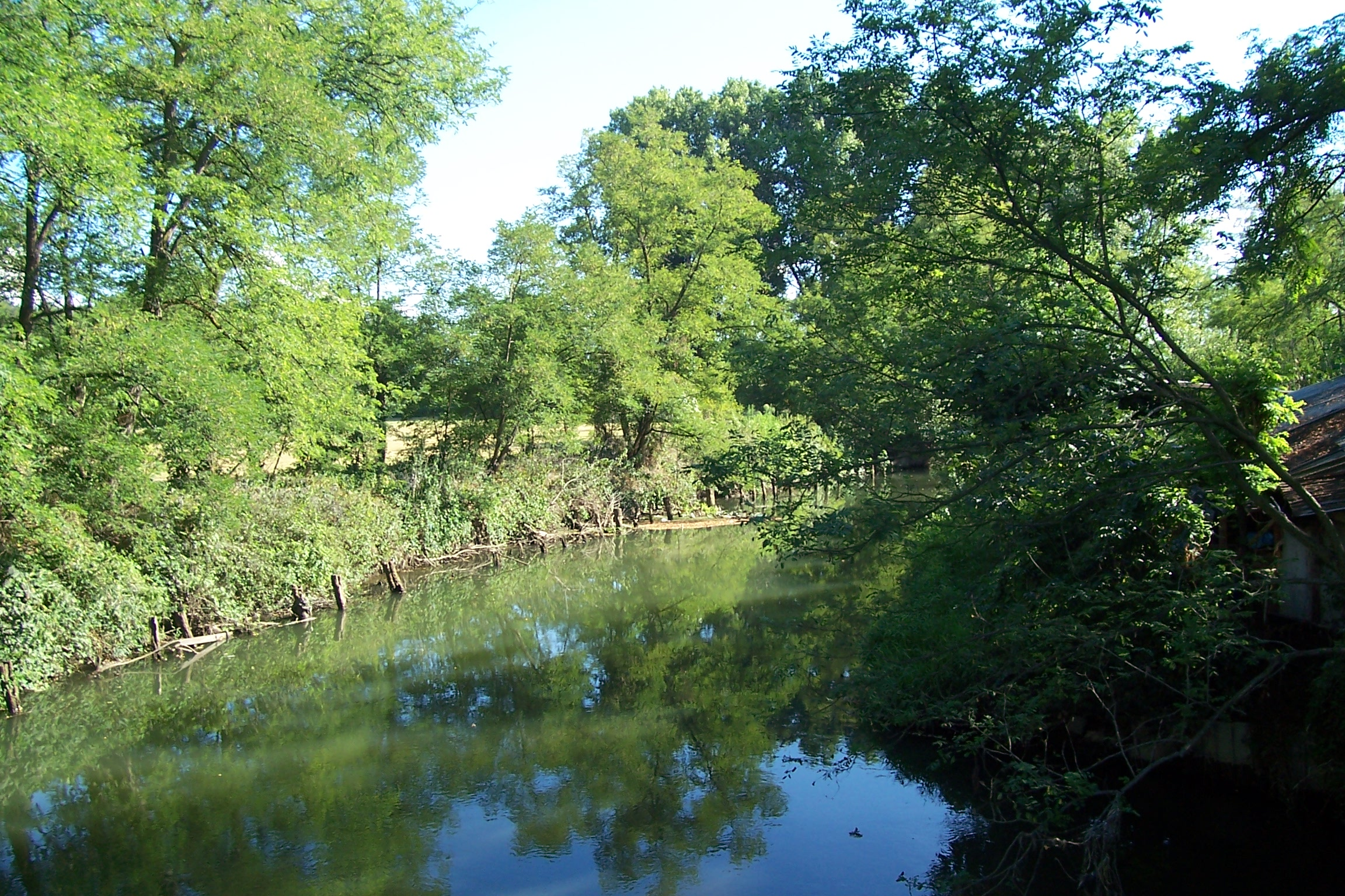 Lardirago (Pavia), l'Olona infariore